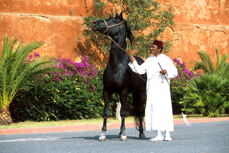 Au haras de Bounika construit en 1994 au cœur d'une Kasbah.